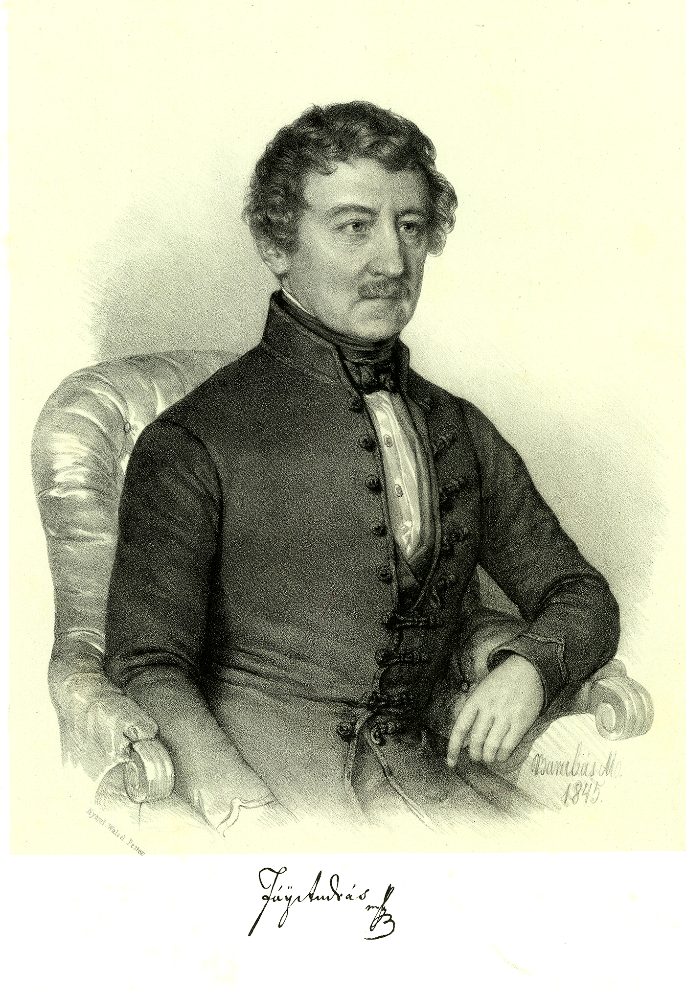 Péceli Fáy András (Kohány, Zemplén vármegye, 1786. május 30. – Pest, 1864. július 26.) író, politikus és nemzetgazda, a magyar reformkor irodalmi és társadalmi mozgalmainak egyik legtevékenyebb alakja